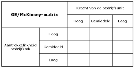 GE/McKinsey-matrix. Zelf in elkaar geknutselt.